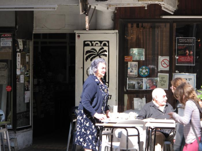 קפה תמר ברחוב שנקין